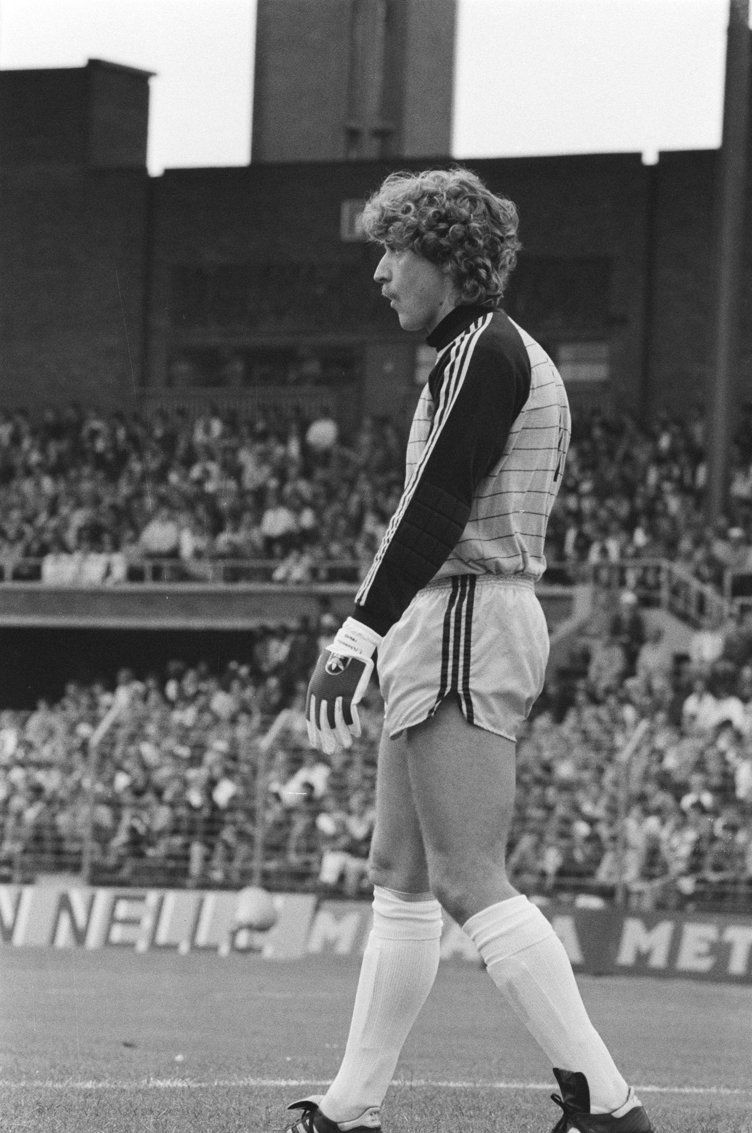 Collectie / Archief : Fotocollectie Anefo Reportage / Serie : [ onbekend ] Beschrijving : Amsterdam 707 toernooi , AZ 67 tegen FC Koln ; Koln-keeper Schumacher, close Datum : 13 augustus 1982 Locatie : Amsterdam, Noord-Holland Trefwoorden : sport, voetbal Persoonsnaam : FC Koln Fotograaf : Croes, Rob C. / Anefo Auteursrechthebbende : Nationaal Archief Materiaalsoort : Negatief (zwart/wit) Nummer archiefinventaris : bekijk toegang 2.24.01.05 Bestanddeelnummer : 932-2772